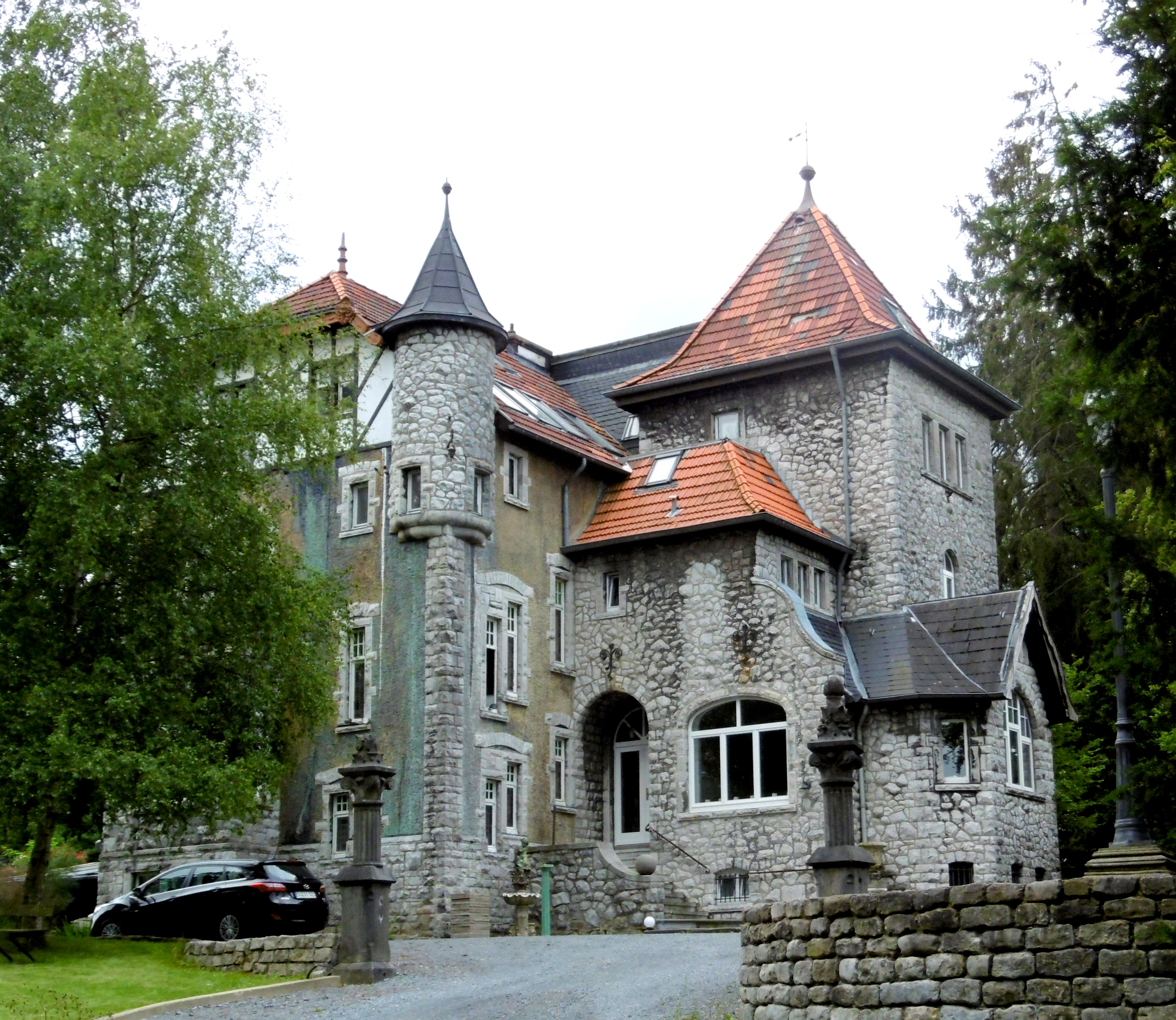 Haus Gostert 102, Atelier Ramírez in Hauset/Belgien